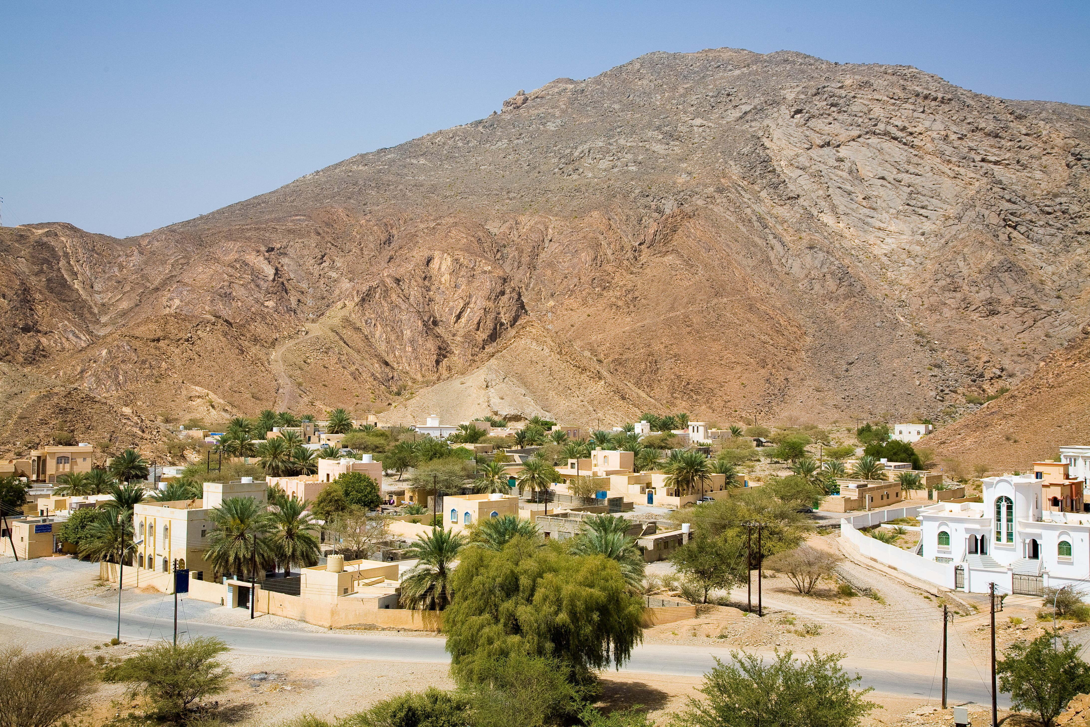 Birkat al-Mawz, Oman